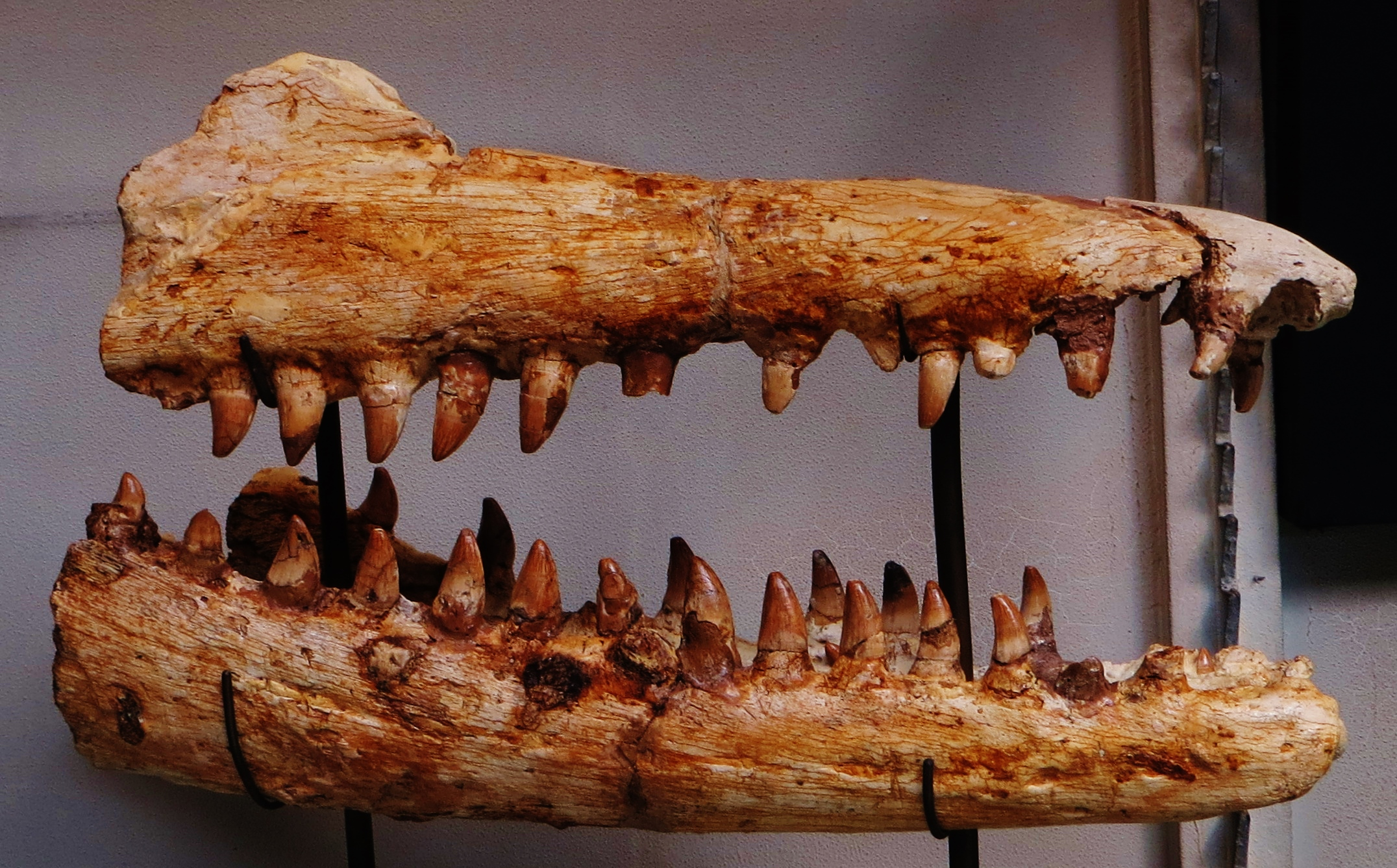 Fossil of Prognathodon, an extinct reptile- Took the photo at Musee d'Histoire Naturelle, Paris